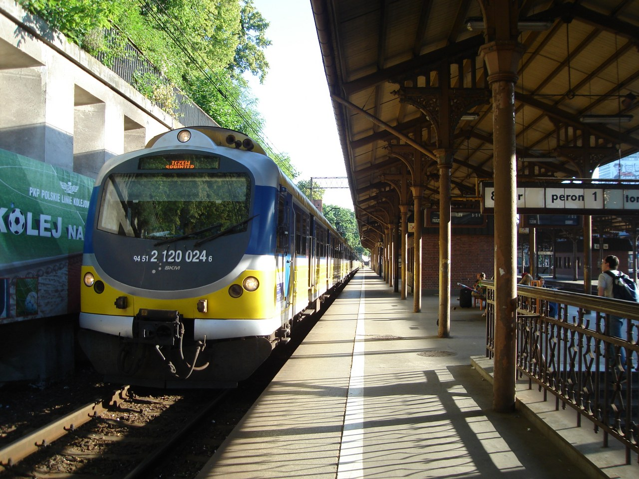 Peron 1 i mur oporowy dworca głównego w Gdańsku.